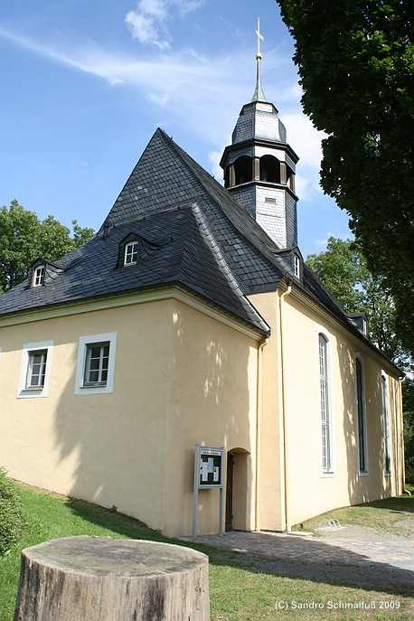 Alte Kirche Chemnitz-Harthau 2009